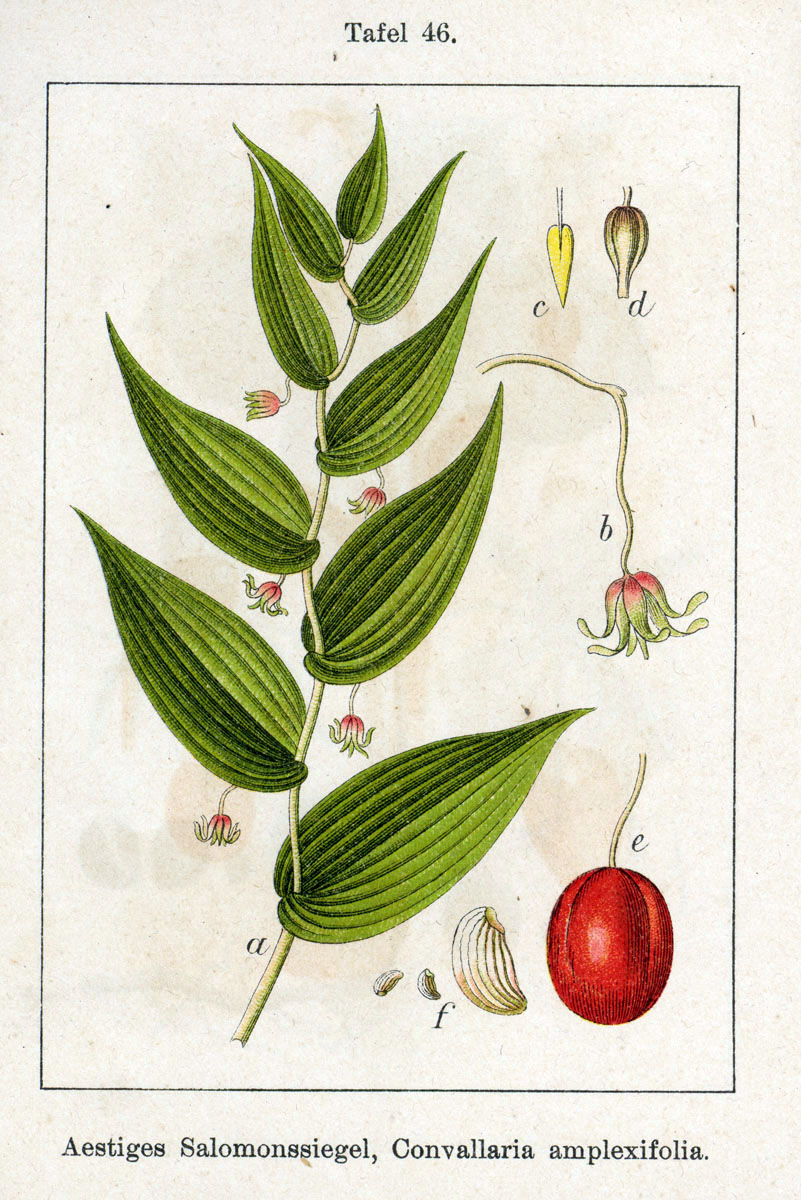 Streptopus amplexifolius (L.) DC., syn. Convallaria amplexifolia (L.) E.H.L.Krause Original Description Aestiges Salomonssiegel, Convallaria amplexifolia